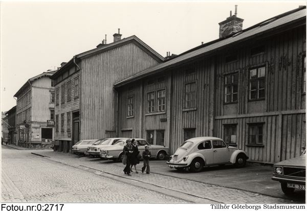 Haga Nygatan 5-9, "Haga Herrgård", i Göteborg, sent 1960-tal.